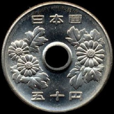 50 Yen Münze_Rückseite